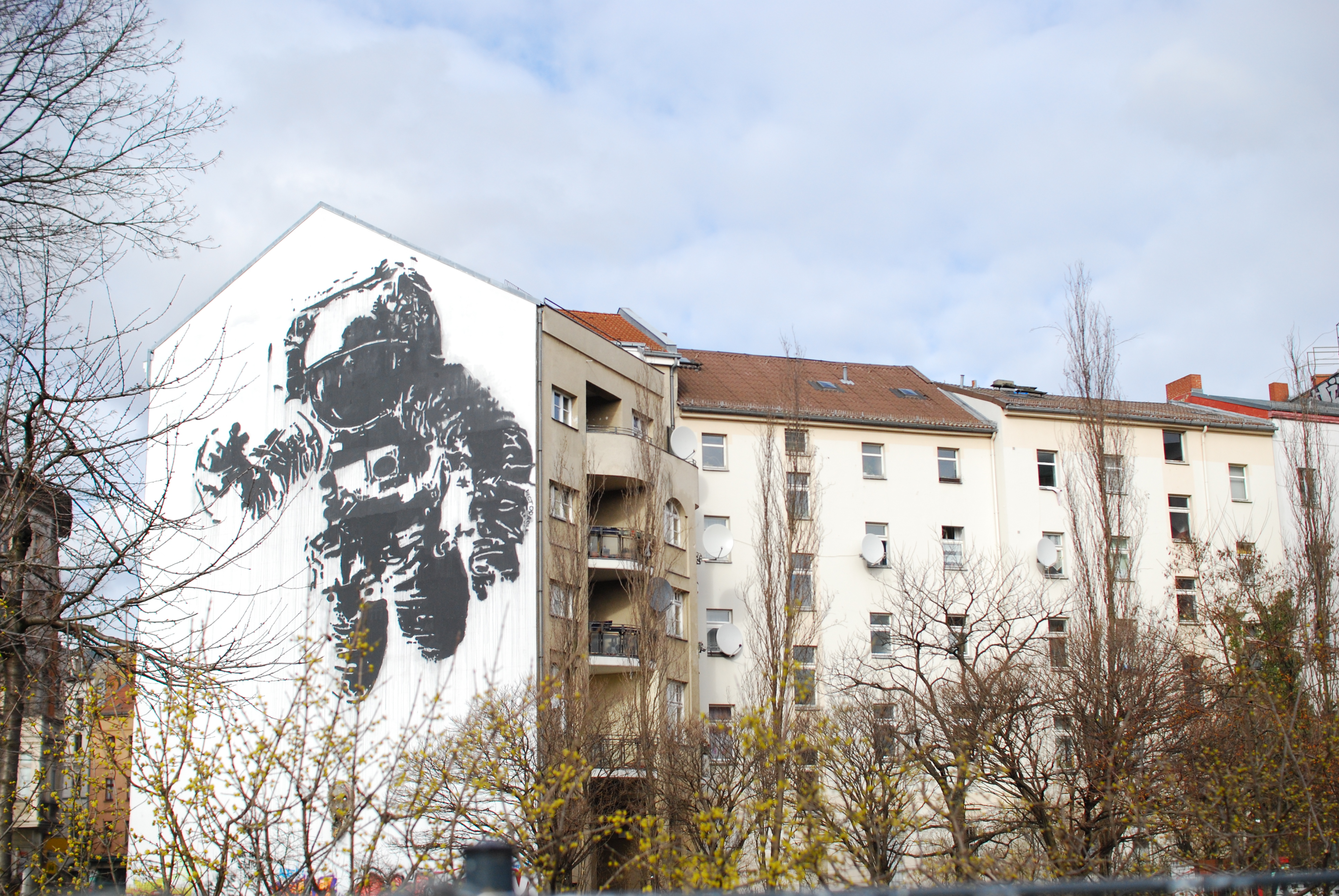 Se hvordan den blev lavet her (link). Mural in Berlin Kreuzberg